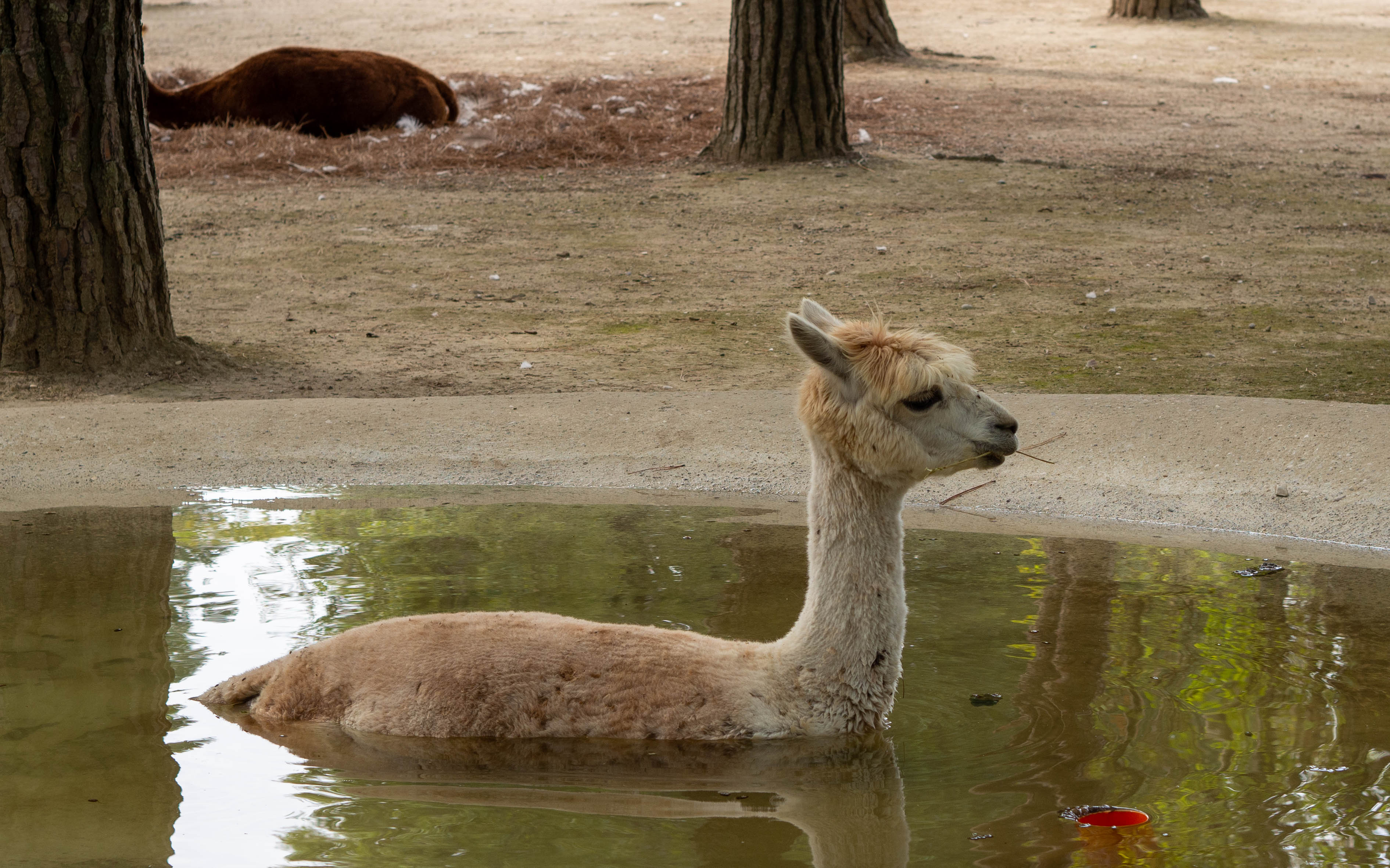 Giornata in famiglia trascorsa nel Parco Zoo Punta Verde di Lignano